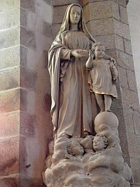 Vierge à l'Enfant. Statue de l'église Saint-Léonard de Fougères (35).